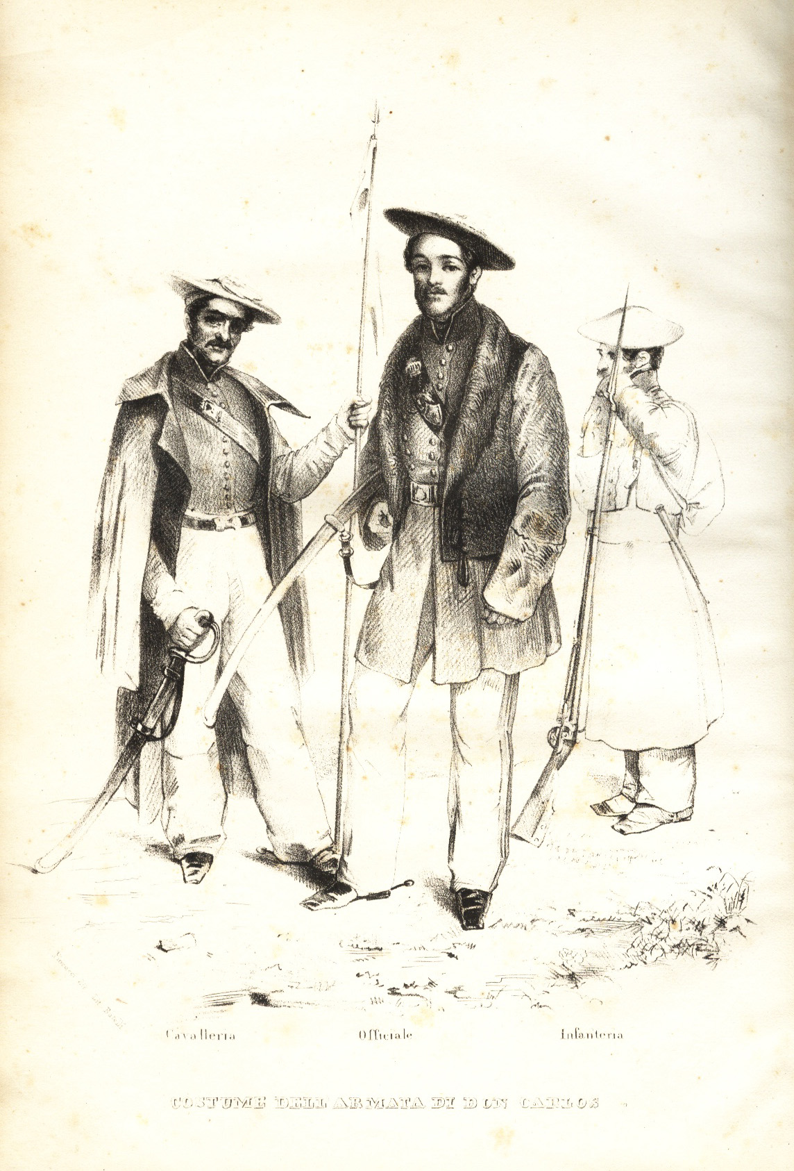 Uniformes del ejército carlista. Dibujo de Isidoro Magués. "Don Carlos e i suoi difensori". Firenze 1837